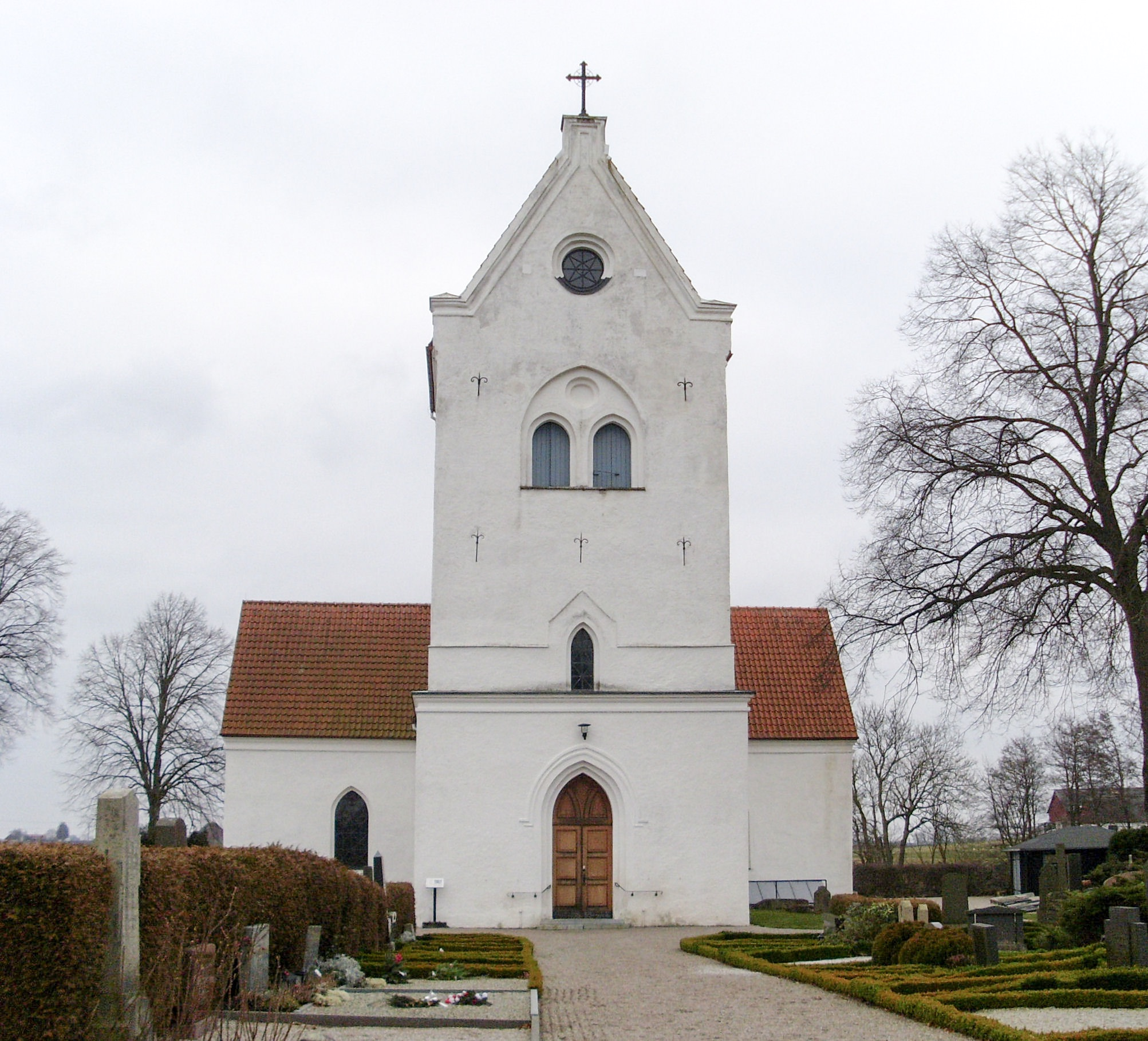 Vollsjö kyrka utanför Vollsjö i Skåne.